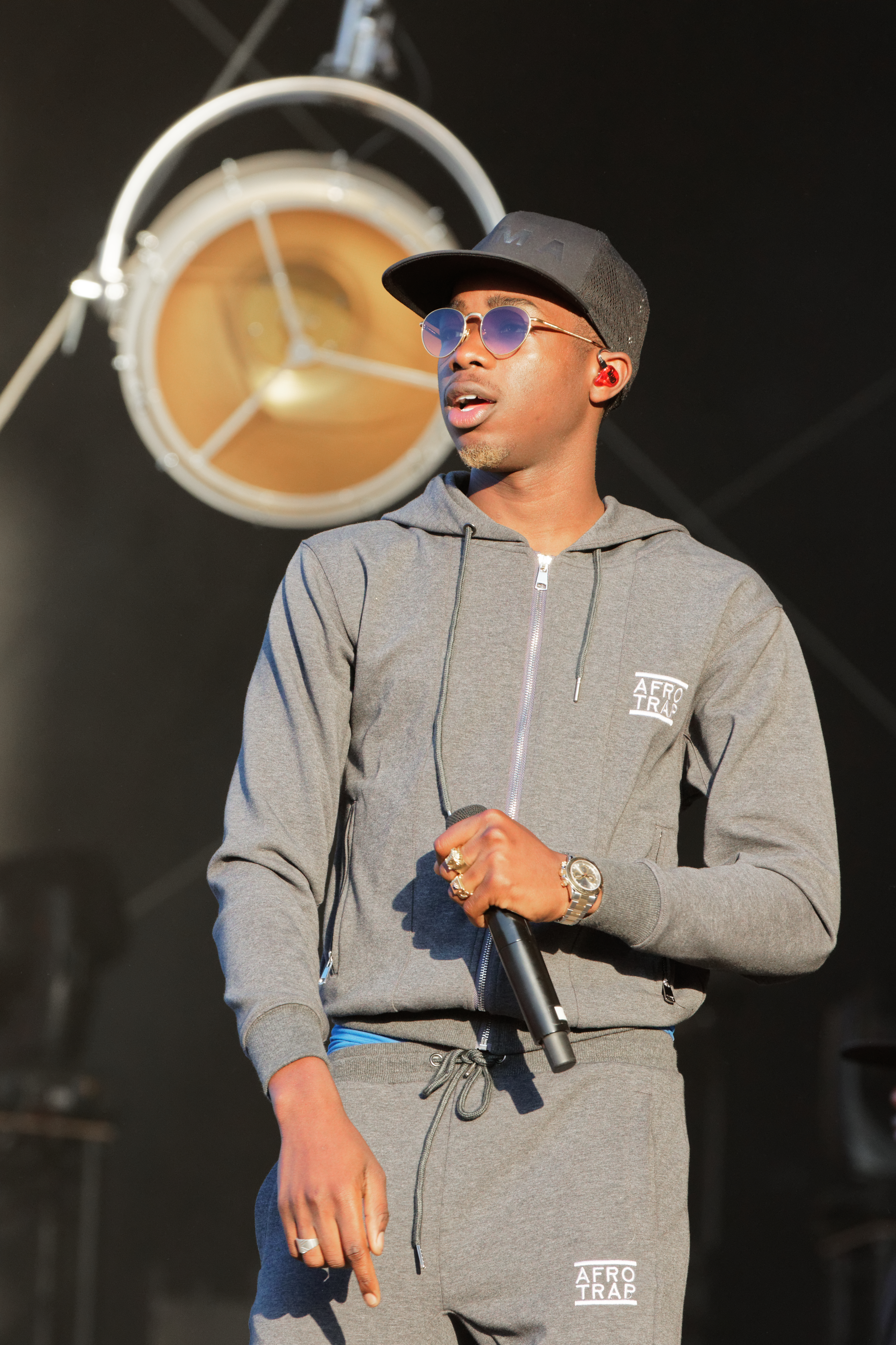 MHD en concert lors du festival des vieilles charrues 2017.